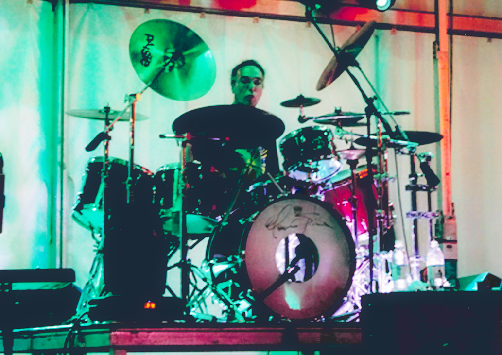 Storie di città